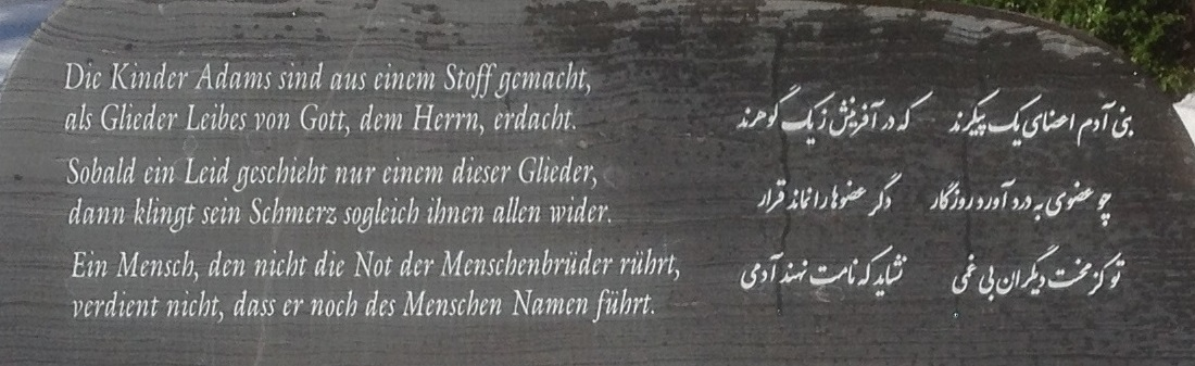 Goslar, Friedhof Hildesheimer Straße, Grabstein von Prof. Dr.-Ing. Reza Ghofrani, Detail: Zitat aus dem Golestan von Saadi